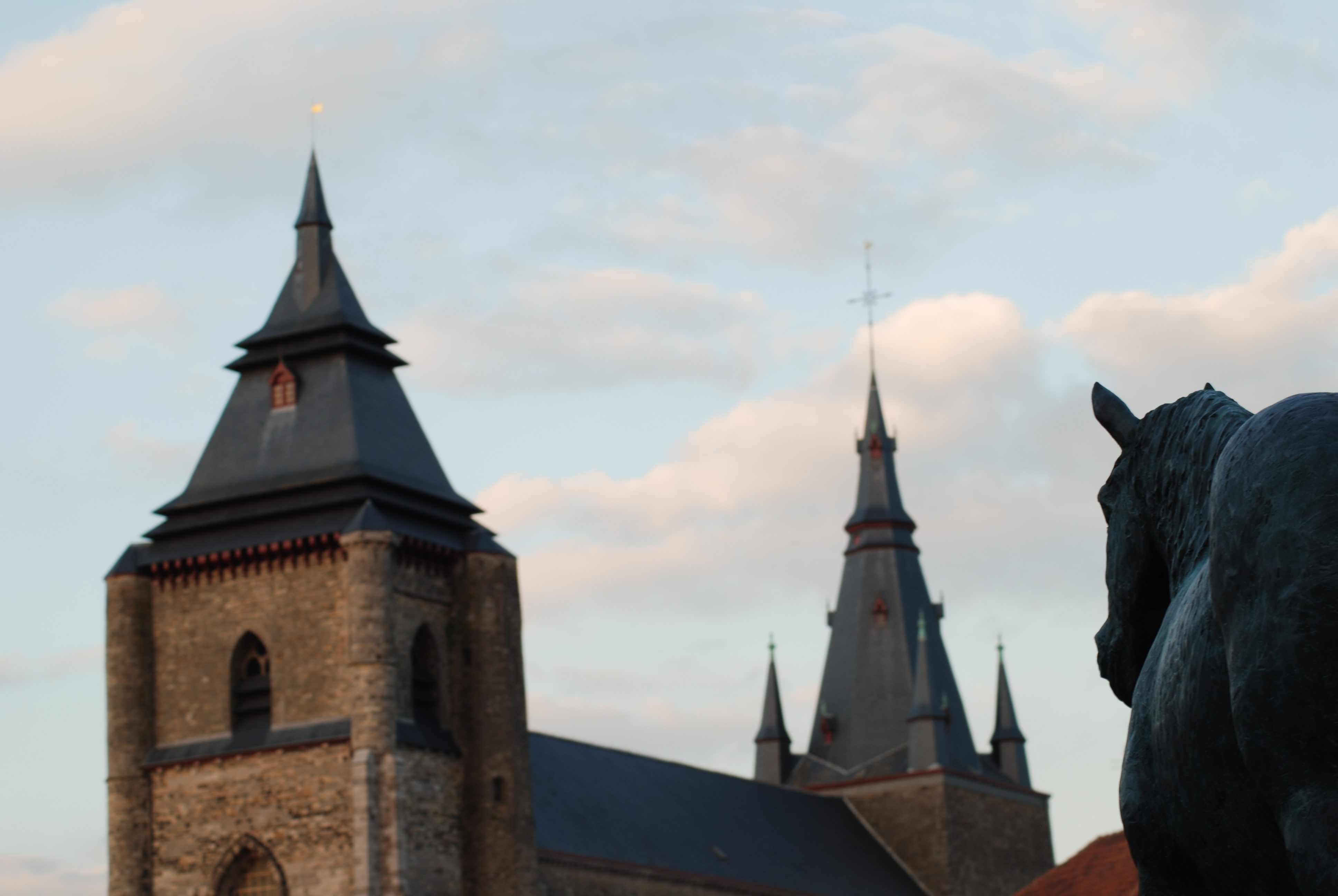 Soignies in bon k'vau